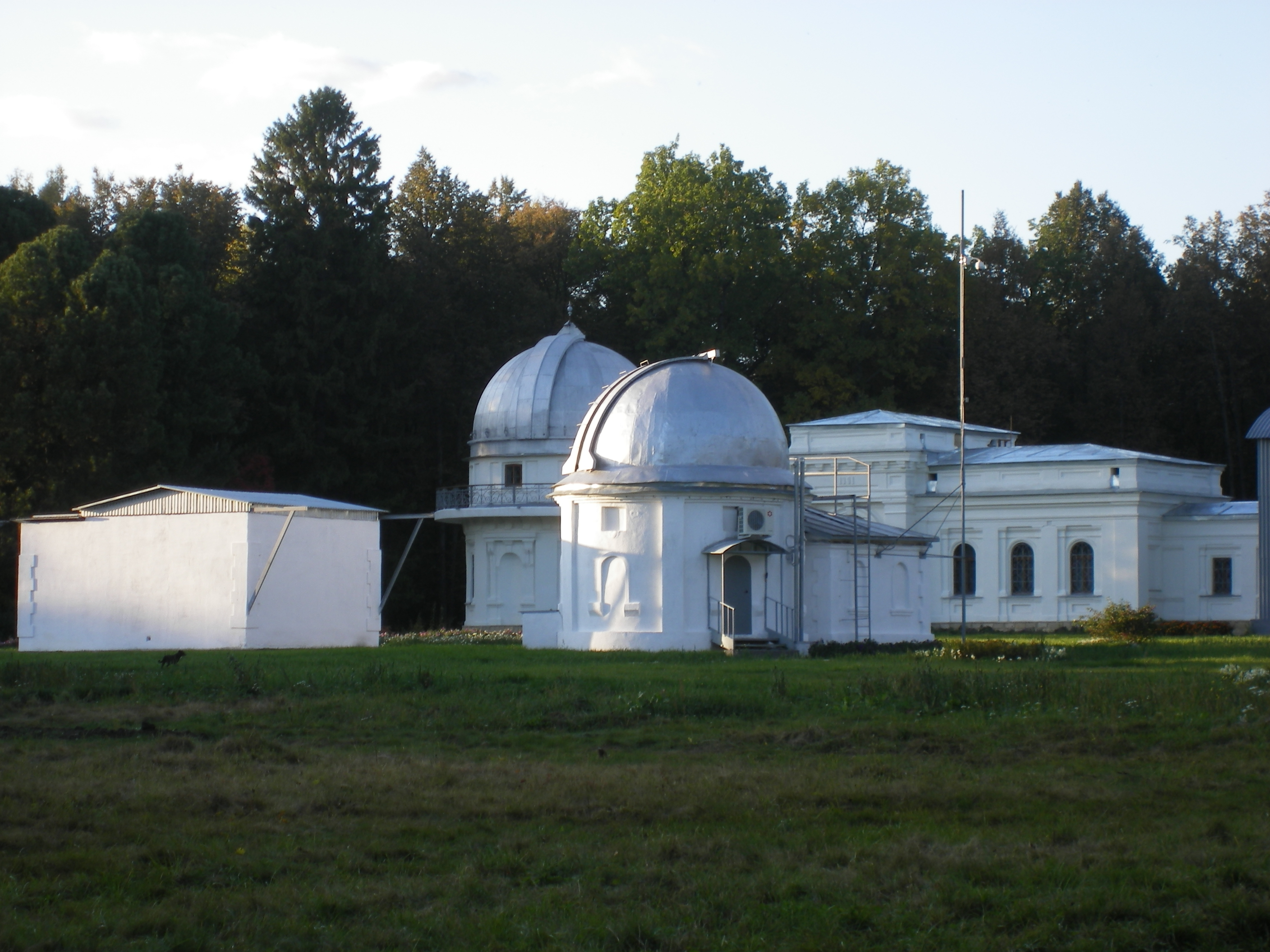 V.P.Engelgardt astronomic observatory / Астрономическая обсерватория им. В.П.Энгельгардта